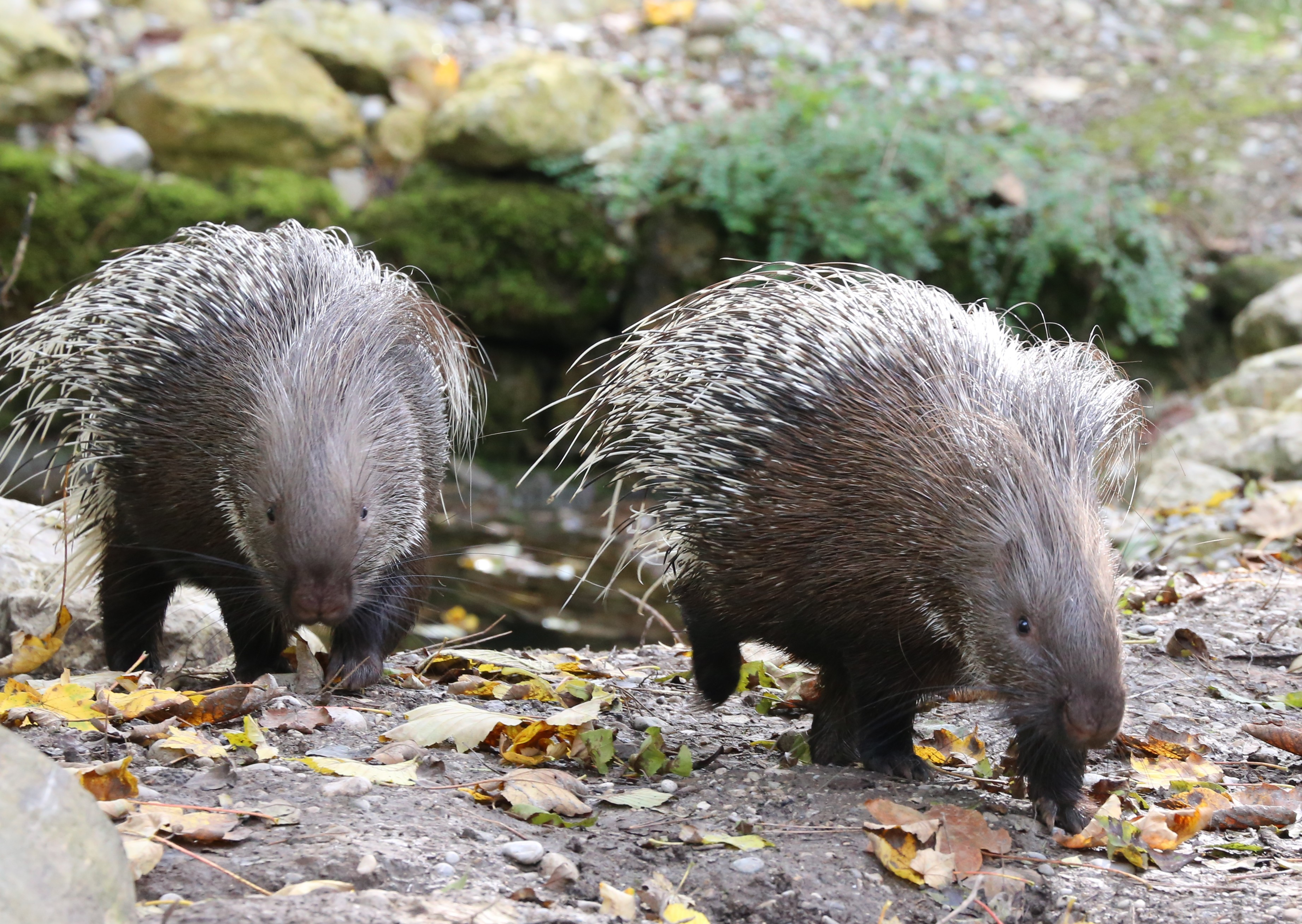 Weißschwanzstachelschwein (Hystrix indica), Tierpark Hellabrunn, München